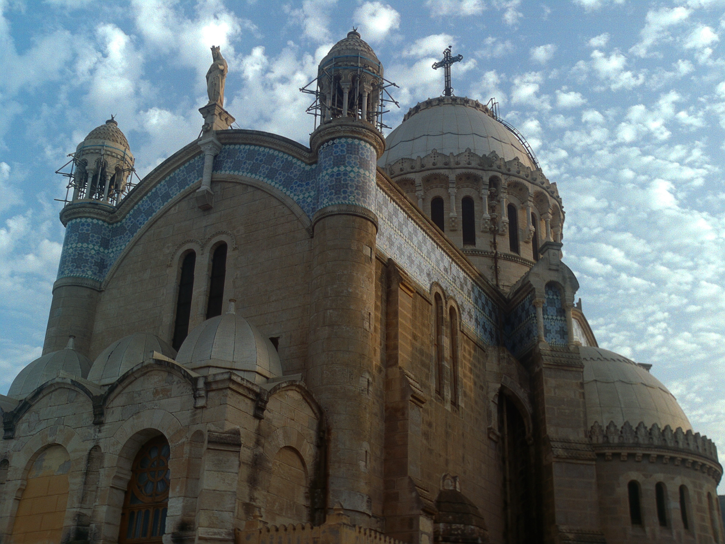 notre dame d'afrique alger bouzareah Image